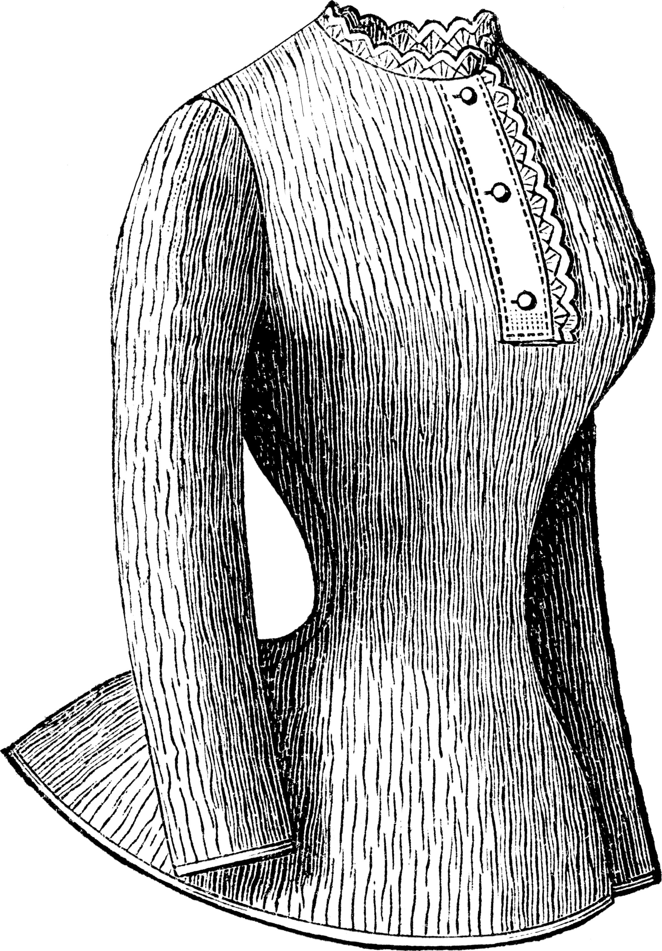 CAMISOLE crêpe de santé pour dames, toutes les tailles. Prix 6,75